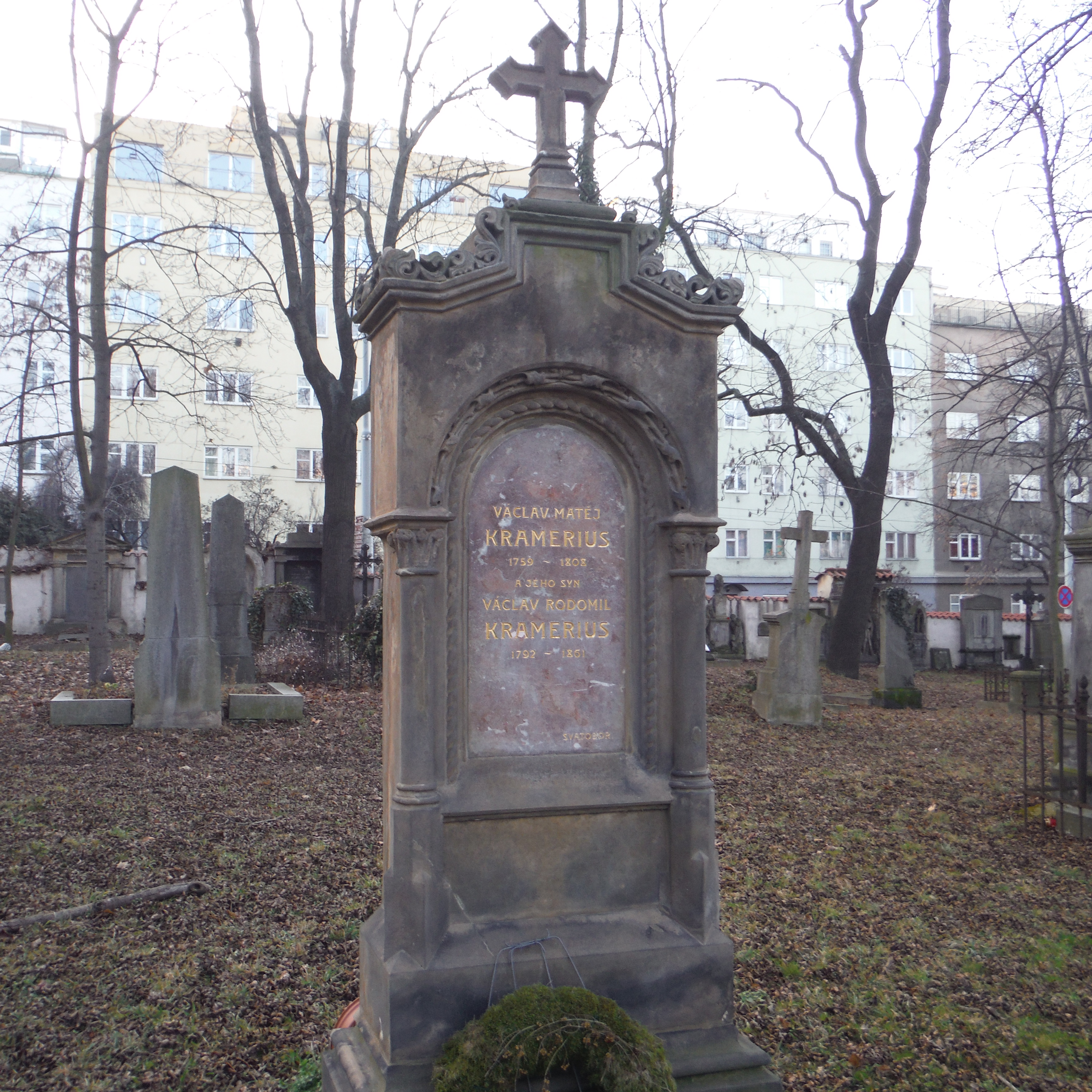 hrob